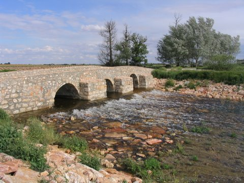 Puente romano de San Miguel